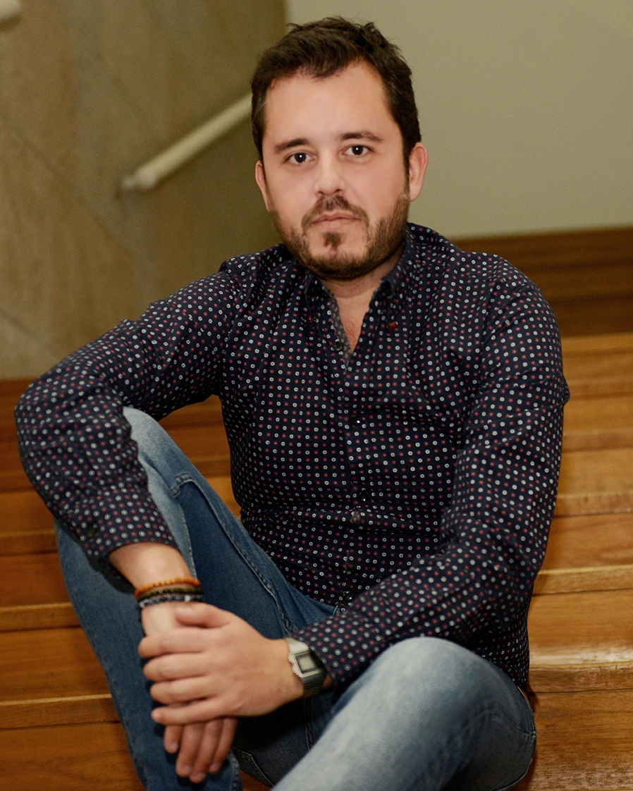 Diego Giráldez retratado por Janite.